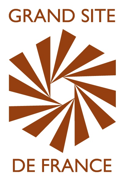 Logo - Grand Site de France